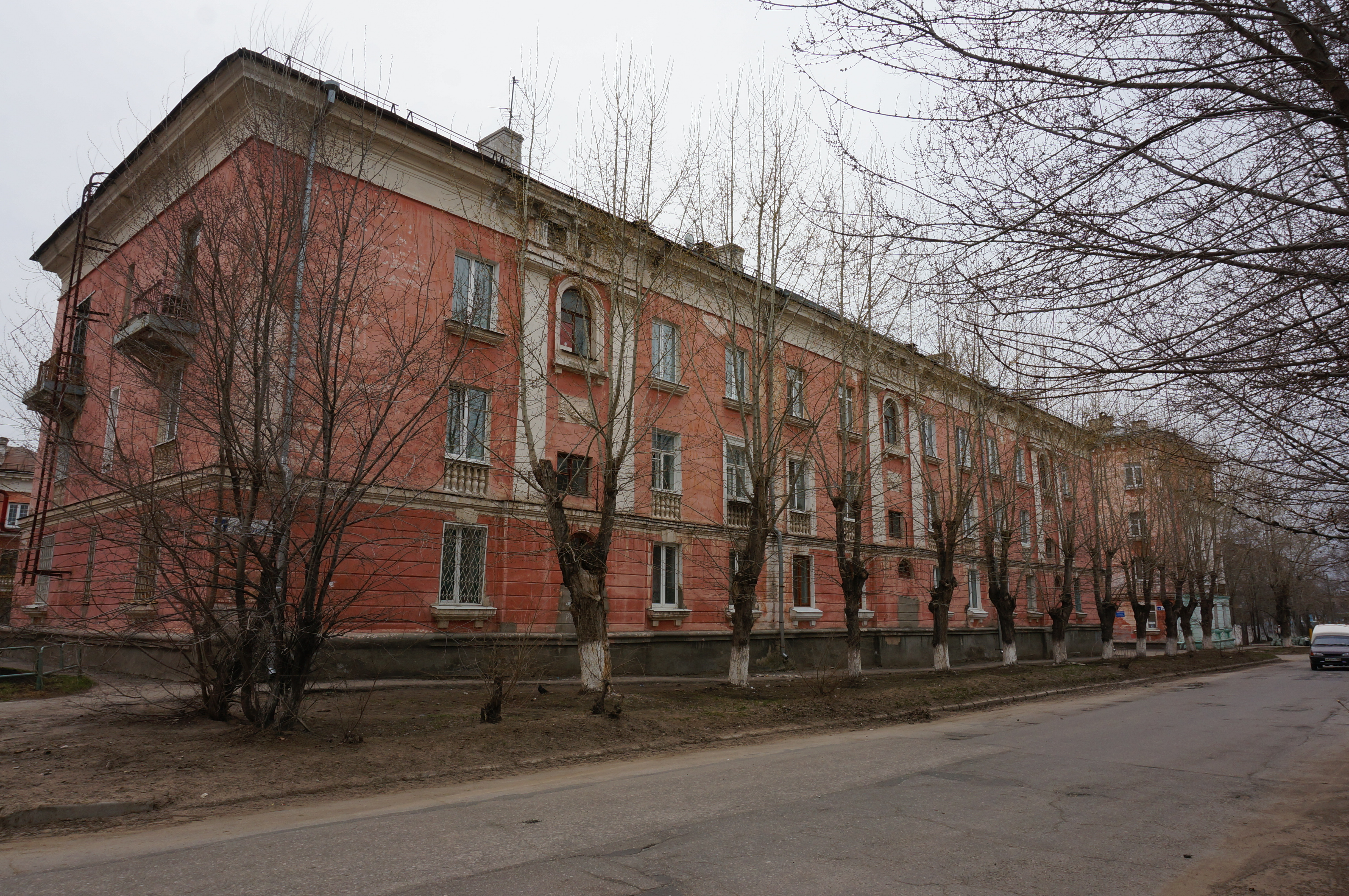 Жилой дом по адресу ул. Никонова 4, Тольятти, Россия. Архитекторы И. Г. Ромм и М. А. Самохвалова. Трехэтажный жилой дом на 24 квартиры сдан в октябре 1956 года. Застройщиками являлись речной порт и судоремзавод. Главный фасад выходит на улицу Никонова. Типичный образец здания эпохи советского классицизма.